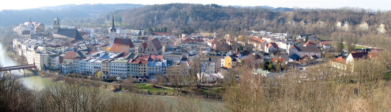 Beschreibung: Panorama Wasserburg am Inn Quelle: selbst fotografiert Datum: April 2005 Fotograf / Zeichner: Patrick Huebgen